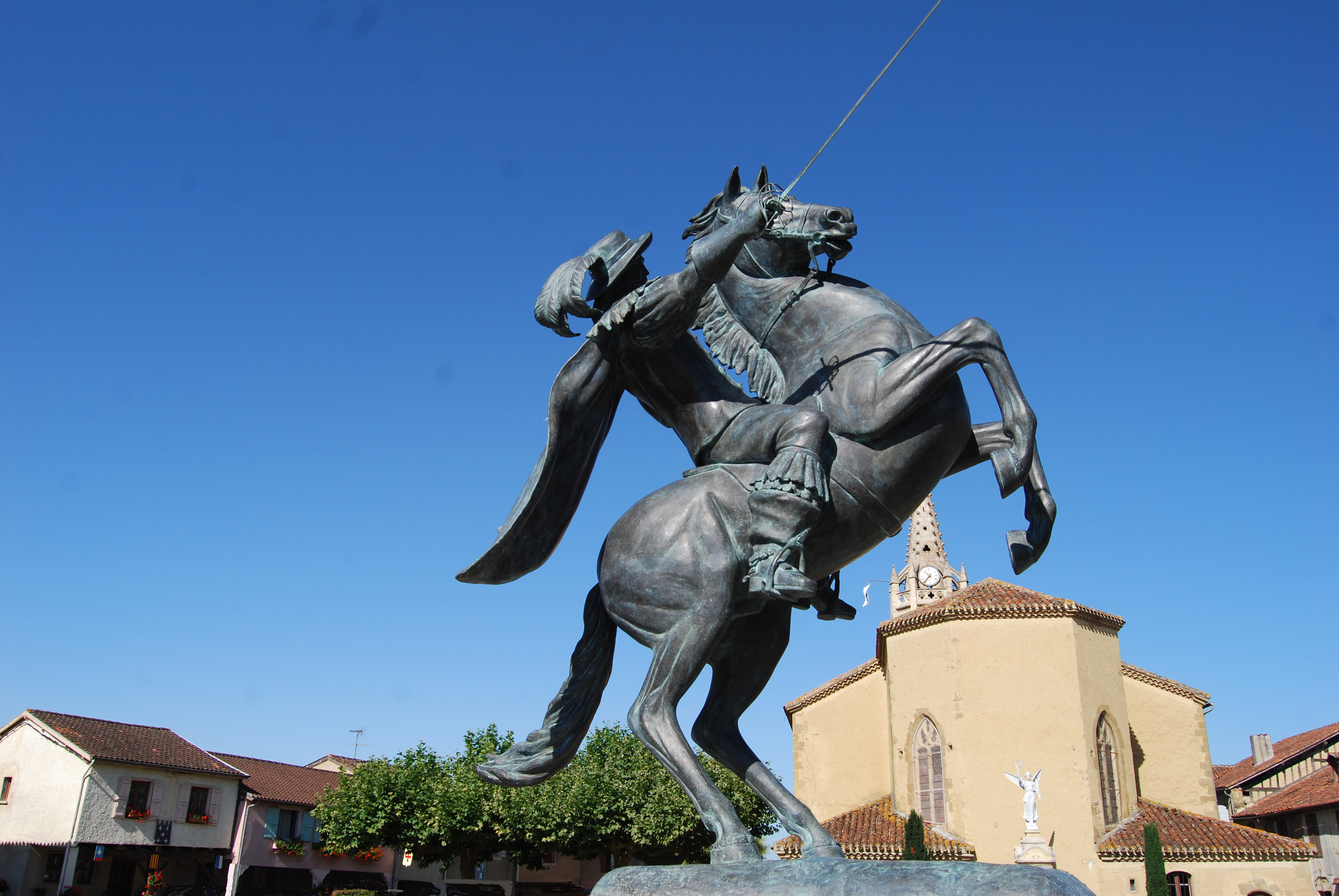 statue équestre d'Artagnan, place de Lupiac, GERS